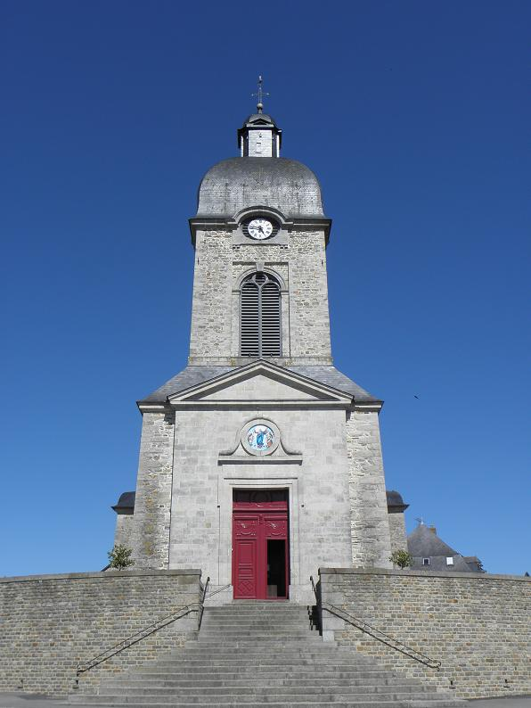 Façade principale de l'église Notre-Dame-de-l'Assomption d'Argentré-du-Plessis (35).